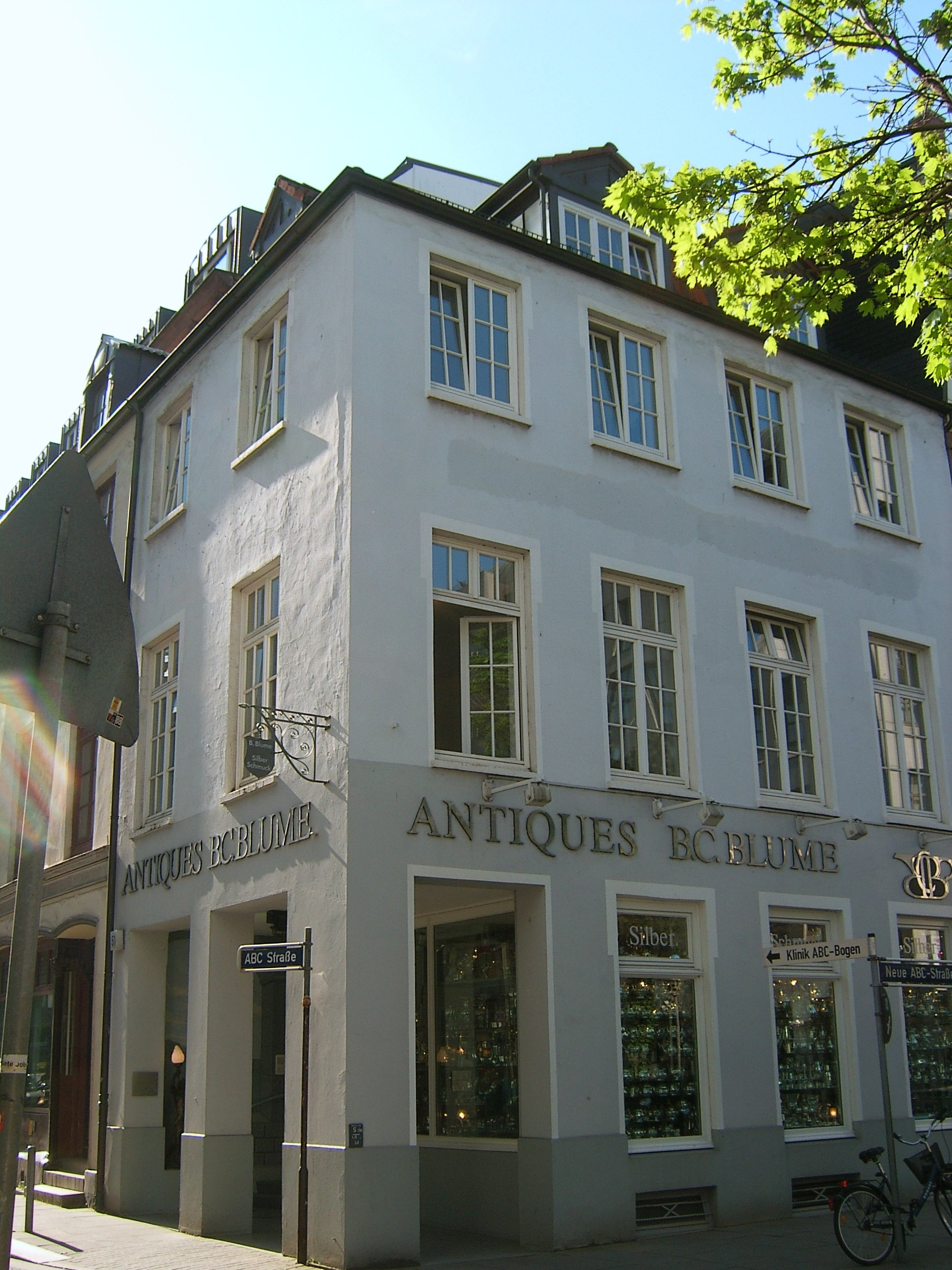 Hamburg, ABC-Straße 51